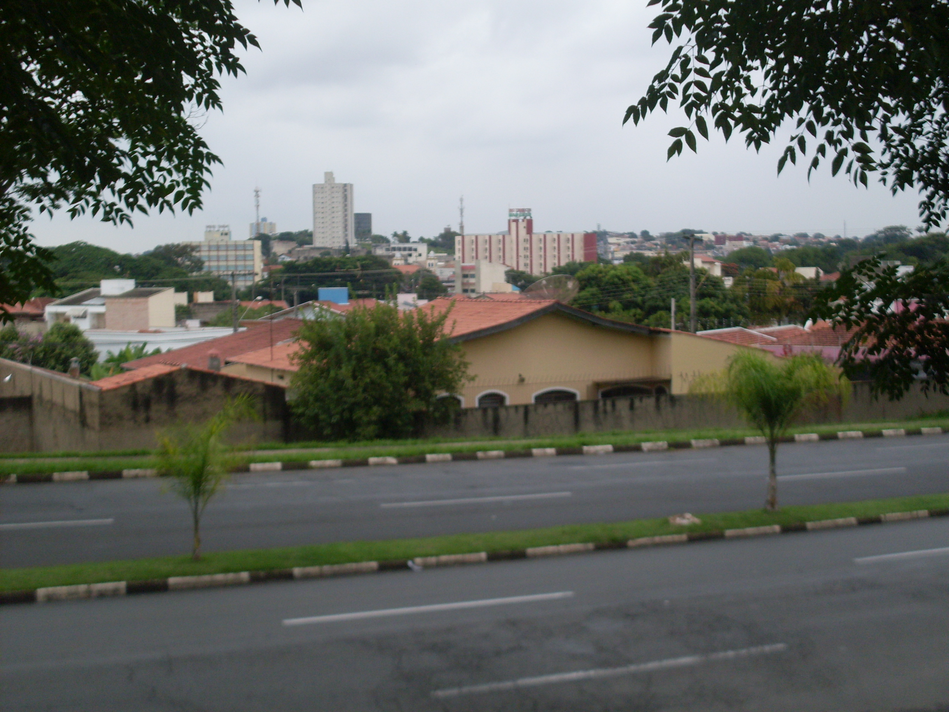 Parte da Região central de Mogi Guaçu vista do Jd Planalto Verde